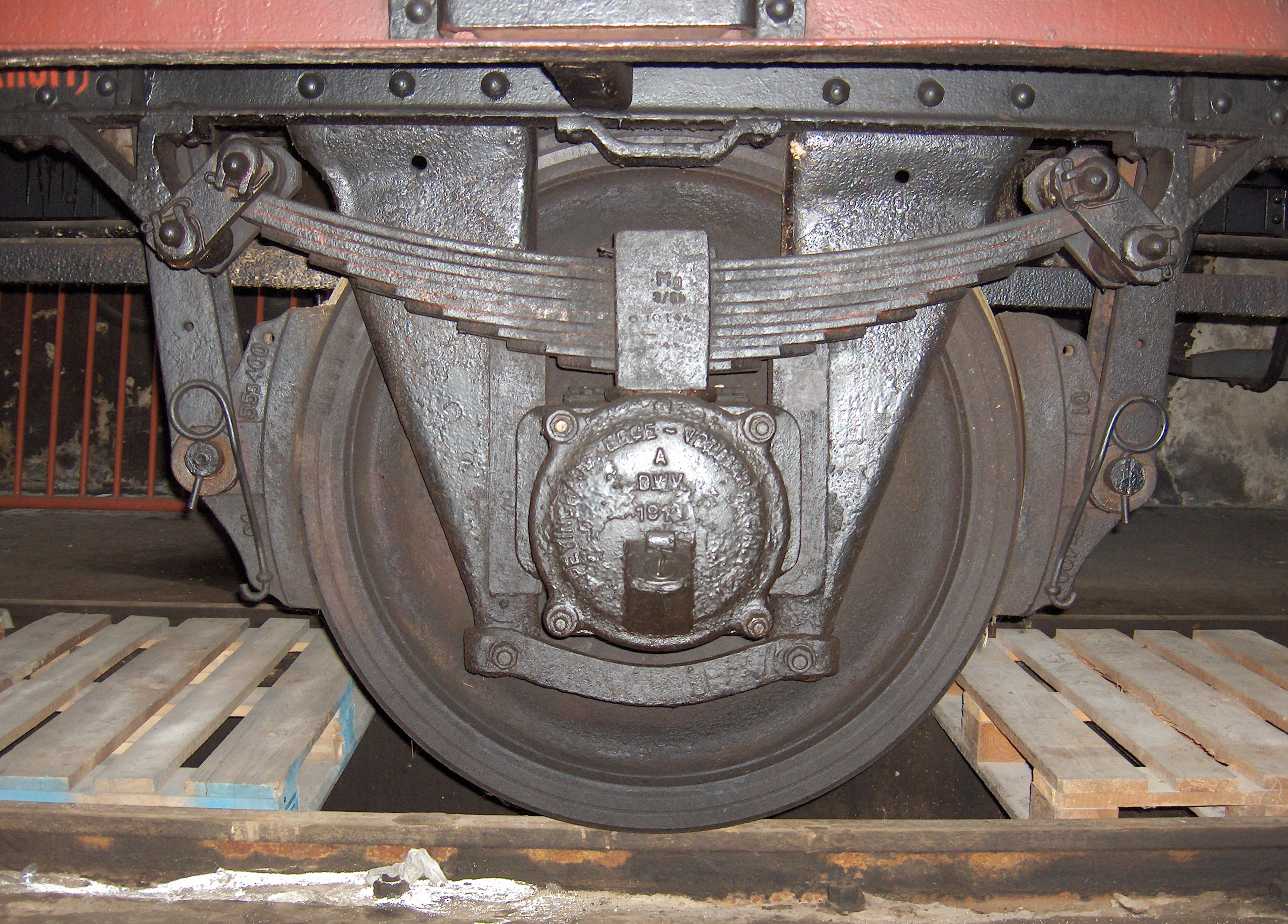 Radsatzlager eines Rungenwagens der Verbandsbauart (Baujahr 1922) mit Gleitlager, 10-lagigen und 1000mm langen Blattfedern, Laschen und Bremse